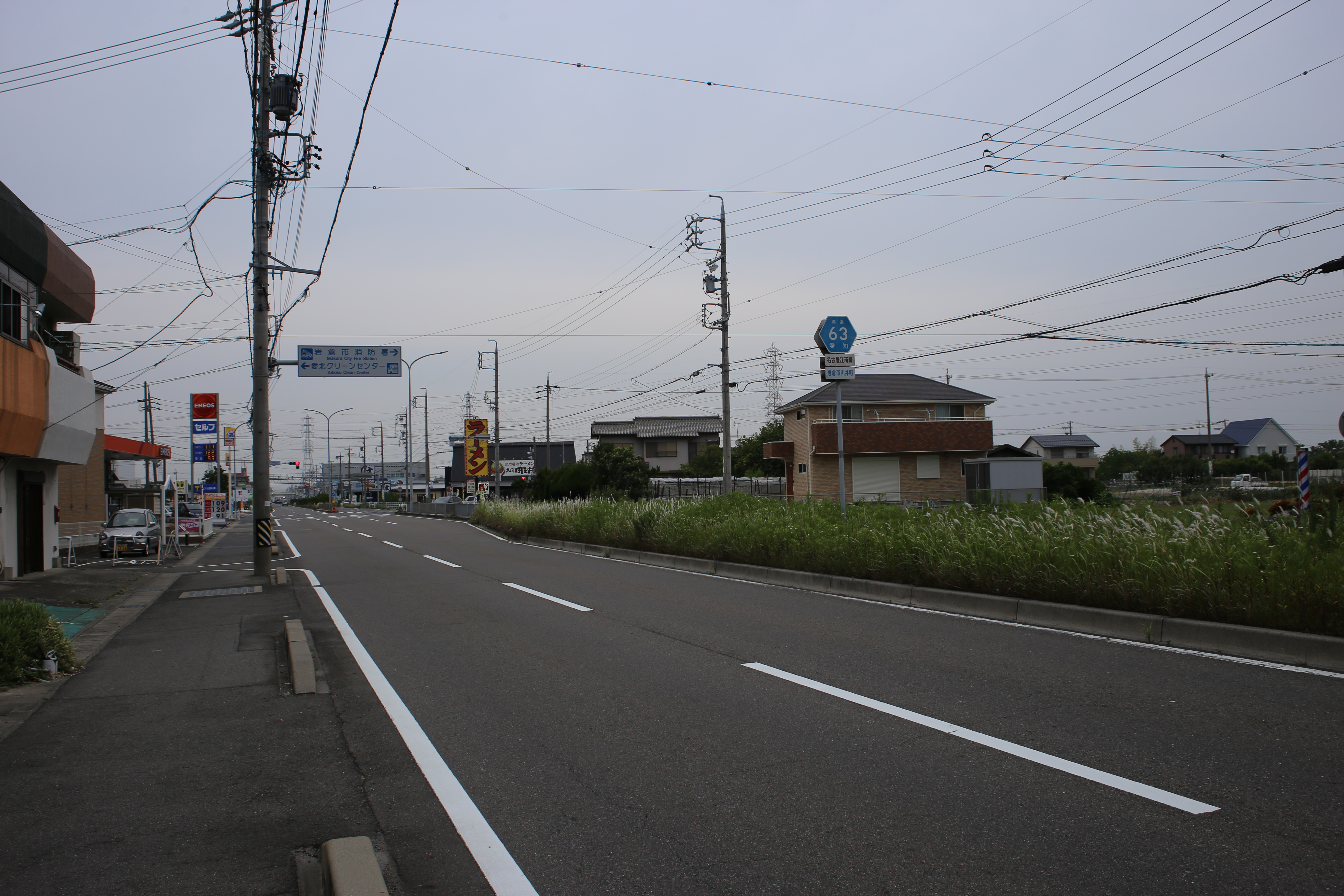 愛知県岩倉市川井町の愛知県道63号名古屋江南線を南西側より撮影